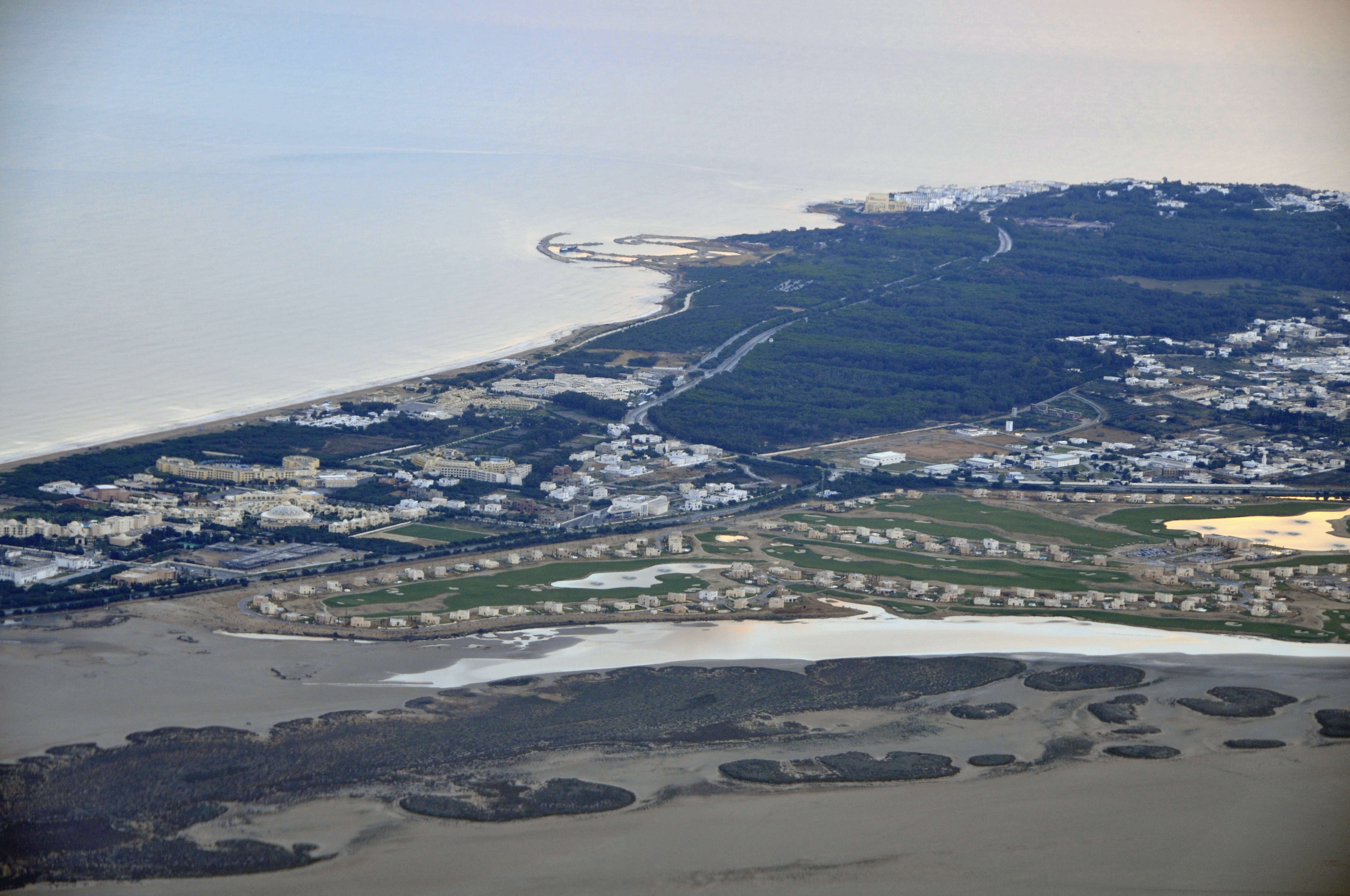 La nouvelle zone touristique et urbaine de la ville de Gammarth. On distingue en haut la nouvelle marina. Plus bas on voit les hotels El Mouradi et Karim. Plus bas encore on voit la nouvelle zone touristique sur la côte. Enfin en bas de la photo, une nouvelle zone urbaine nouvellement en construction et gagnée sur la Sebkhat Ariana. La foret de Gammarth est petit à petit grignotée par l'urbanisation galopante